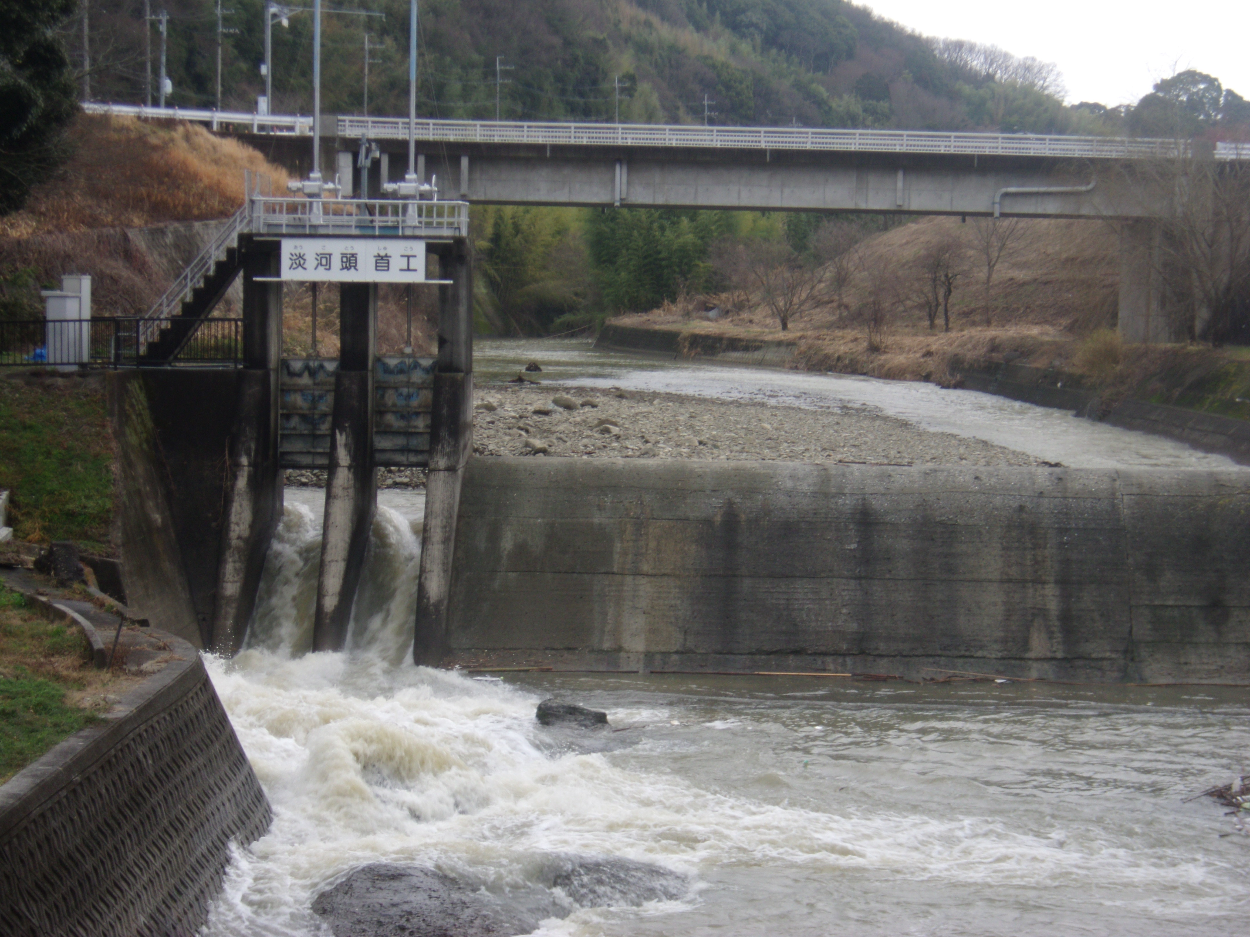 兵庫県神戸市北区木津川を流れる淡河川に設けられた淡河疎水の頭首工（取水口）